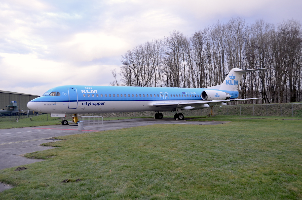 Aviodrome Lelystad. Cityhopper Fokker 100, PH-OFA. Foto: Erik Swierstra.